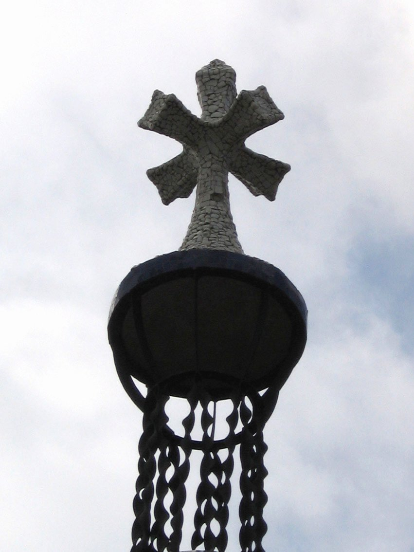 Cruz de cuatro brazos, de Antoni Gaudí, Parque Güell (Barcelona)